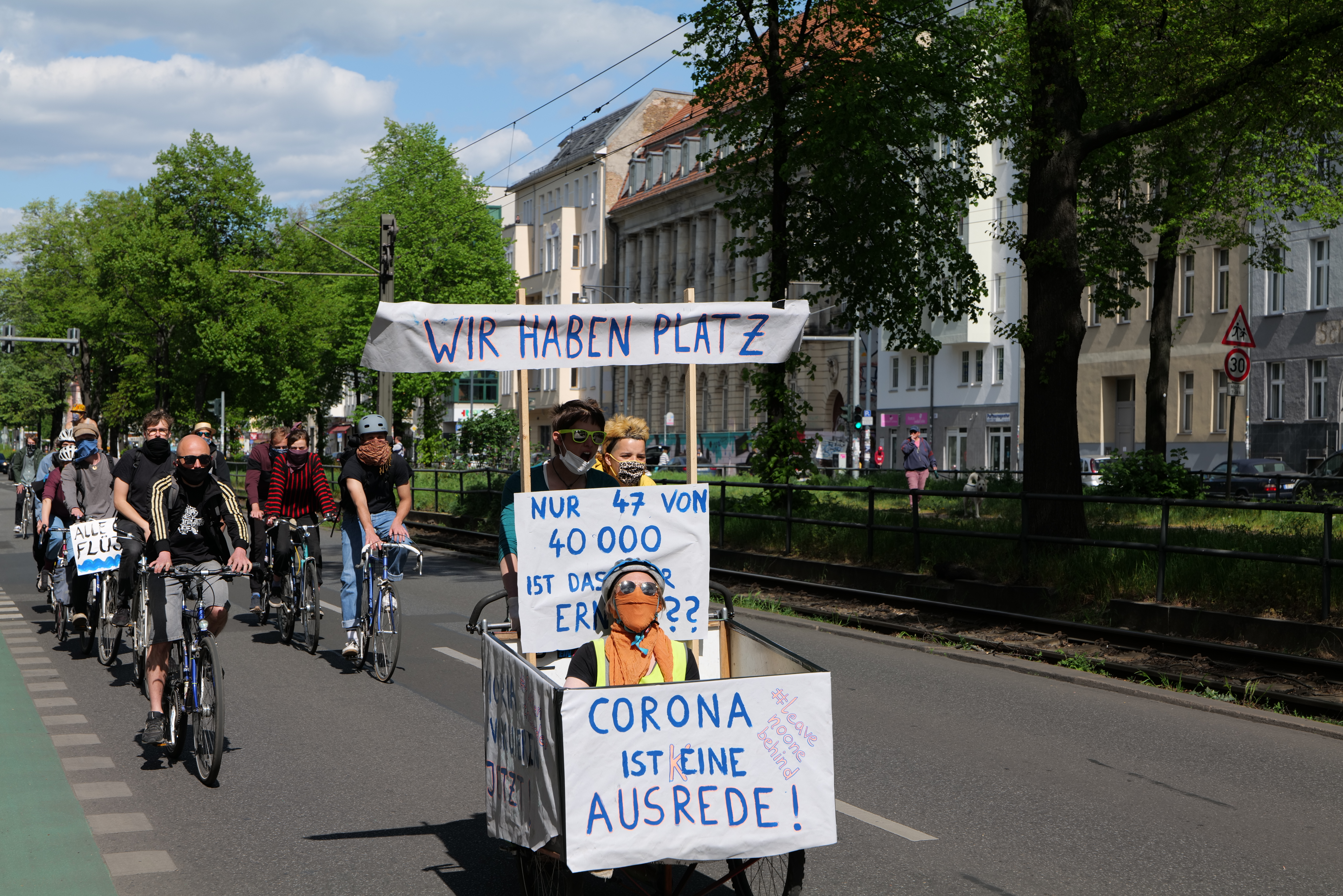 Critical Mass Fahrraddemonstration unter dem Motto LeaveNoOneBehind für die Evakuierung der Geflüchteten aus den Lagern auf den griechischen Inseln vom Antonplatz zum Neptunbrunnen am Roten Rathaus in Berlin am 26. April 2020.